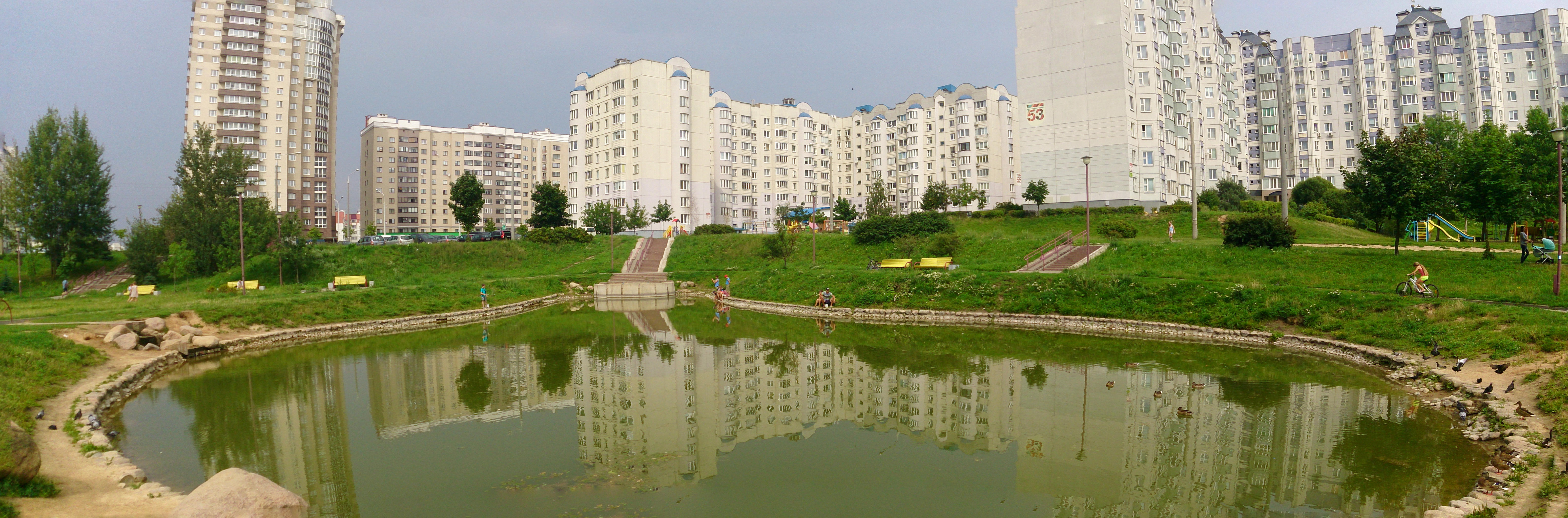 Kuntsevshchina, Minsk, Belarus